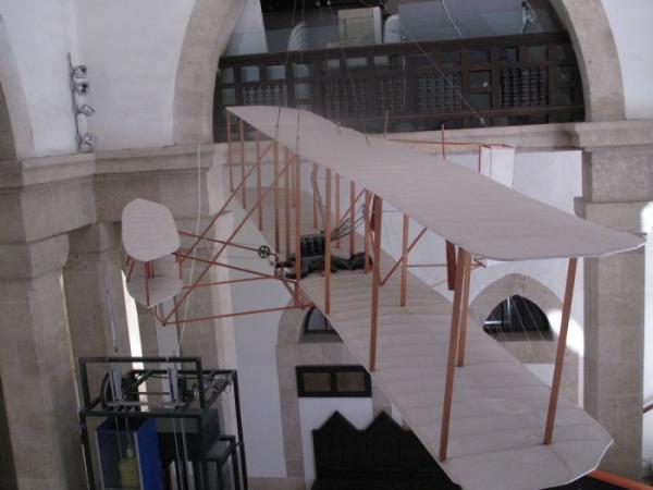 דגם המטוס הממונע הראשון של האחים רייט במדעטק בחיפה